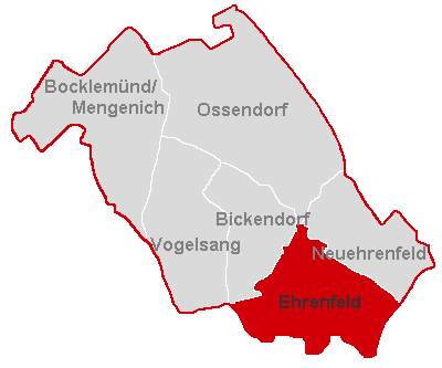 Lagekarte Stadtteil Ehrenfeld im Stadtbezirk Köln-Ehrenfeld